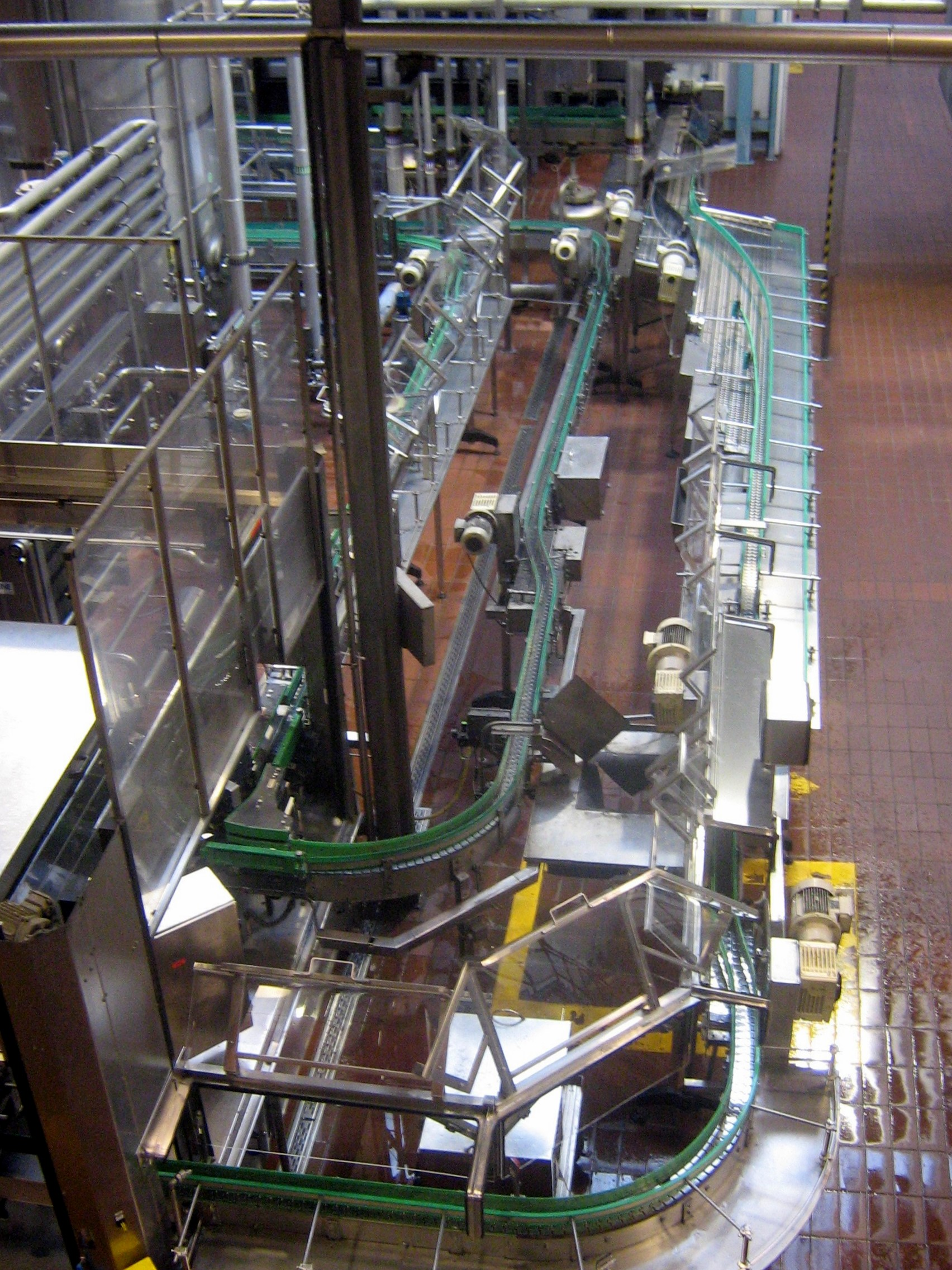 linia do rozlewu piwa do butelek